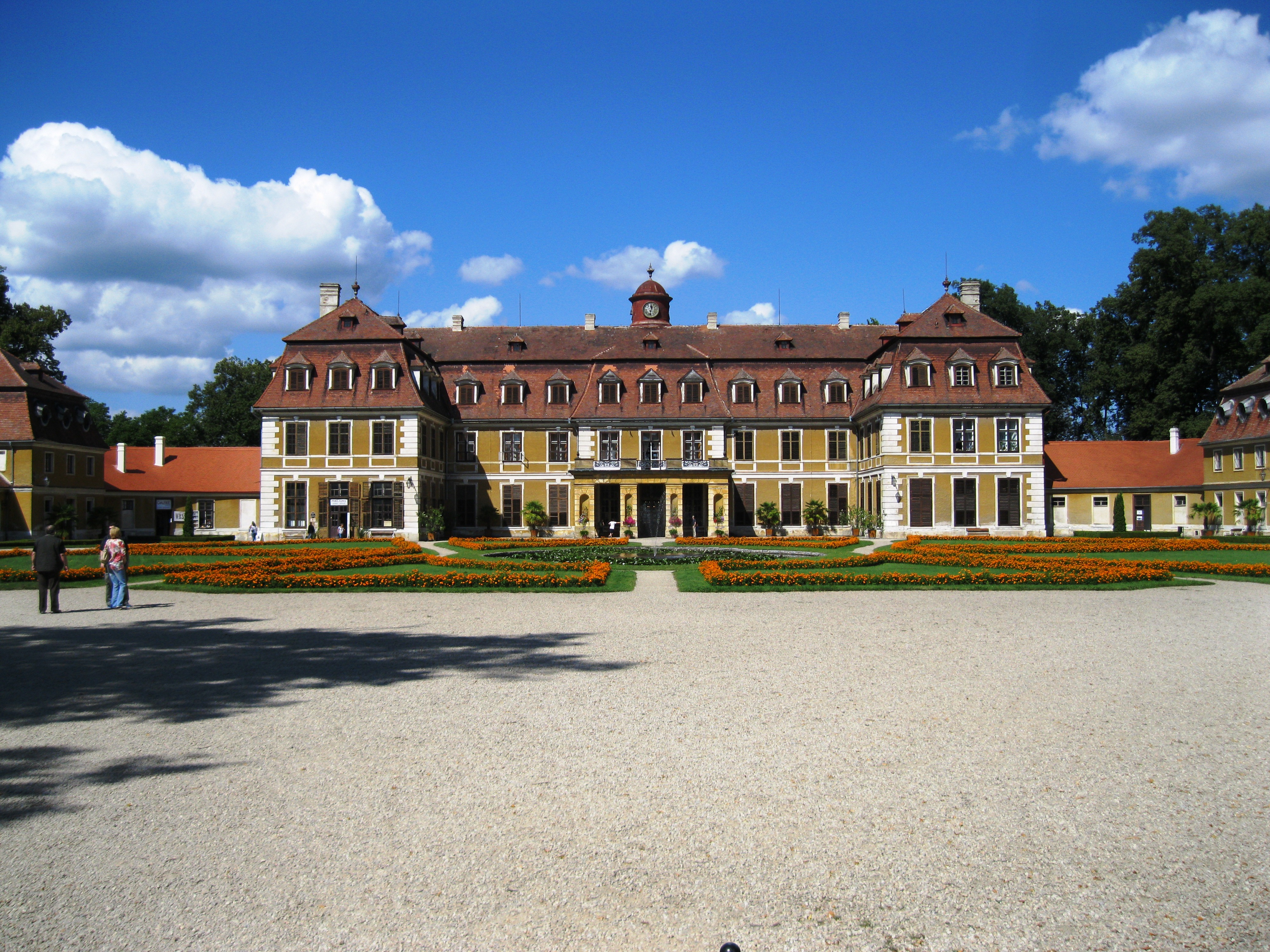 Zámek Rájec, Blanenská 1, Rájec